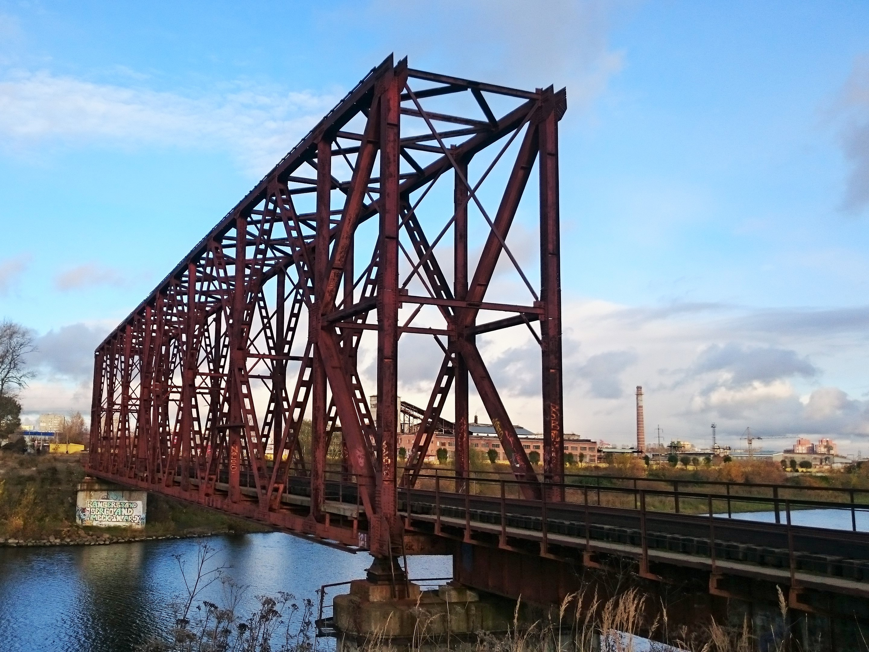 Железнодорожный мост через р. Которосль в Красном Перекопе.